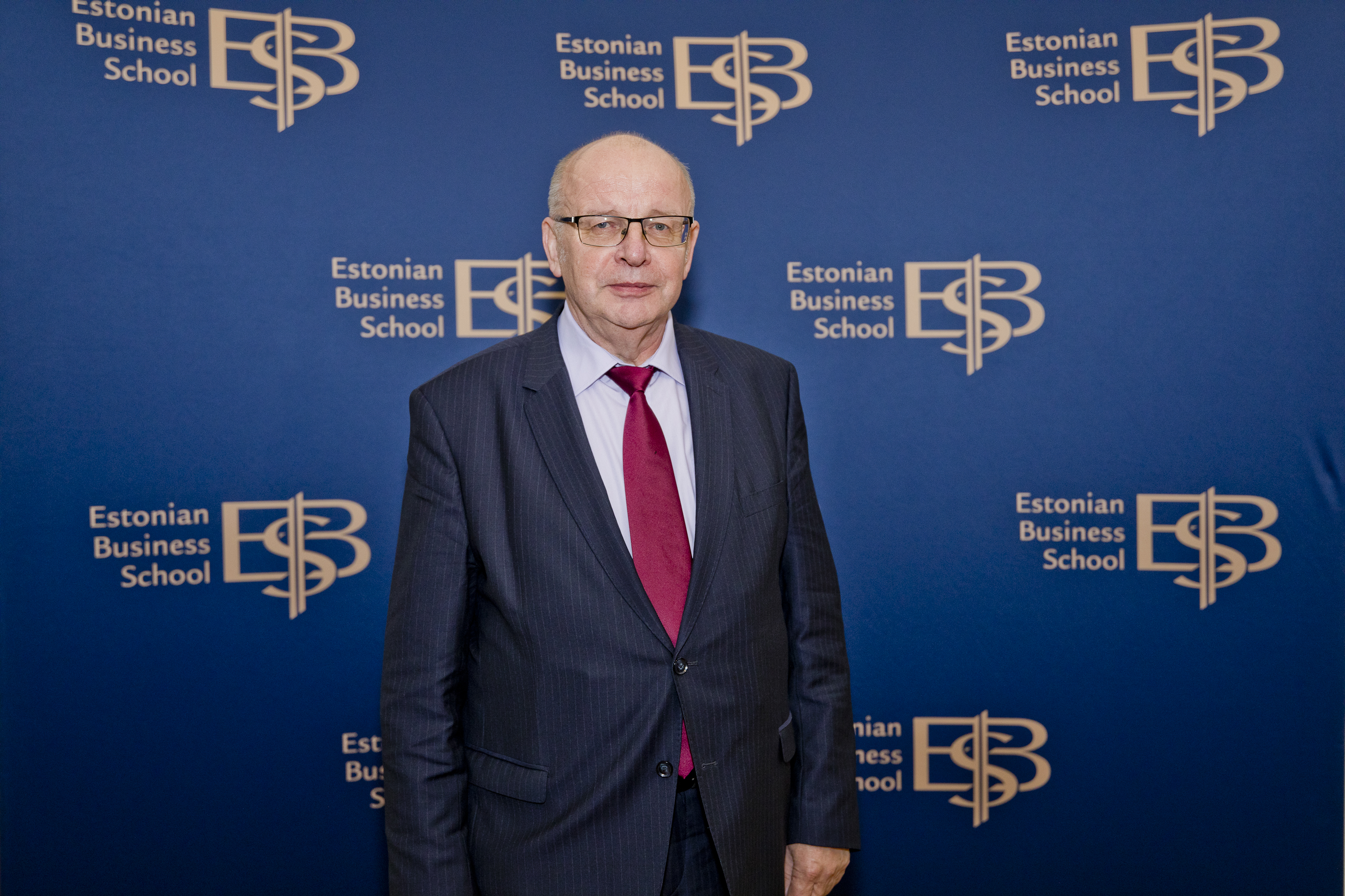 Pildistas: A. Kaljuvee